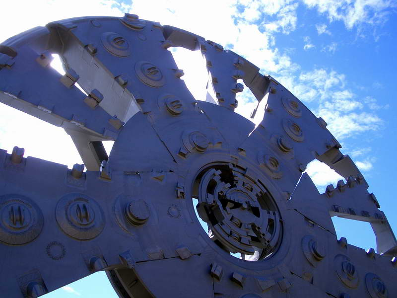 Elbtunnelschneidrad TRUDE vor dem Museum der Arbeit in Hamburg-Barmbek-Nord. Durchmesser: 14,2m; Gewicht: 380t.